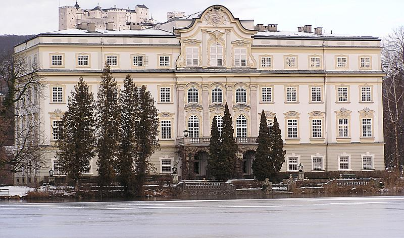 Schloß Leopoldskron in Salzburg Das Bild wurde von mir im Dezember 2003 aufgenommen und steht unter der FDL. MatthiasKabel 22:44, 7. Jan 2004 (CET)